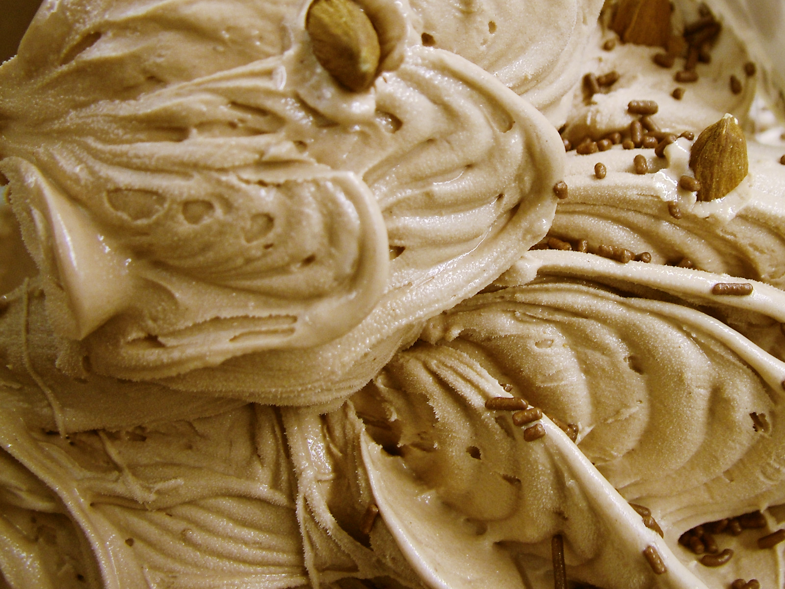 Caramel Nut Ice Cream